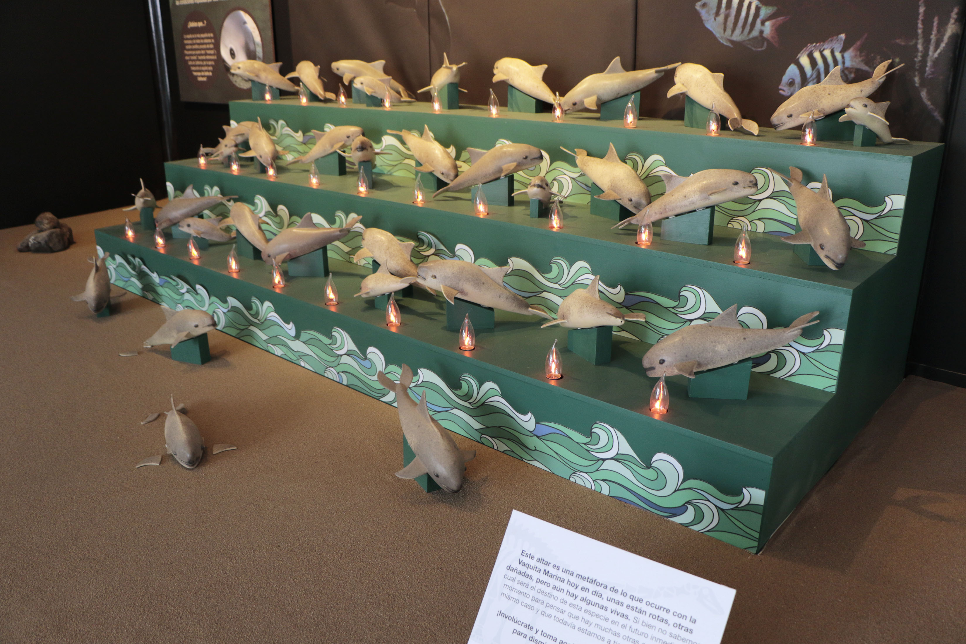 Miércoles 14 de febrero de 2018. Un museo de visita 2018…para muestra un botón tiene presencia en el Museo de Historia Natural albergando en su vestíbulo hasta el 28 de febrero la colección de litografías del pintor Pablo O´Higgins (1904-1983) piezas que forman parte del acervo del Museo de la Ciudad de México, donado por María de la Fuente de O´Higgins. Fotografía: Tania Victoria/ Secretaría de Cultura CDMX Miércoles 14 de febrero de 2018. Un museo de visita 2018…para muestra un botón tiene presencia en el Museo de Historia Natural albergando en su vestíbulo hasta el 28 de febrero la colección de litografías del pintor Pablo O´Higgins (1904-1983) piezas que forman parte del acervo del Museo de la Ciudad de México, donado por María de la Fuente de O´Higgins. Fotografía: Tania Victoria/ Secretaría de Cultura CDMX